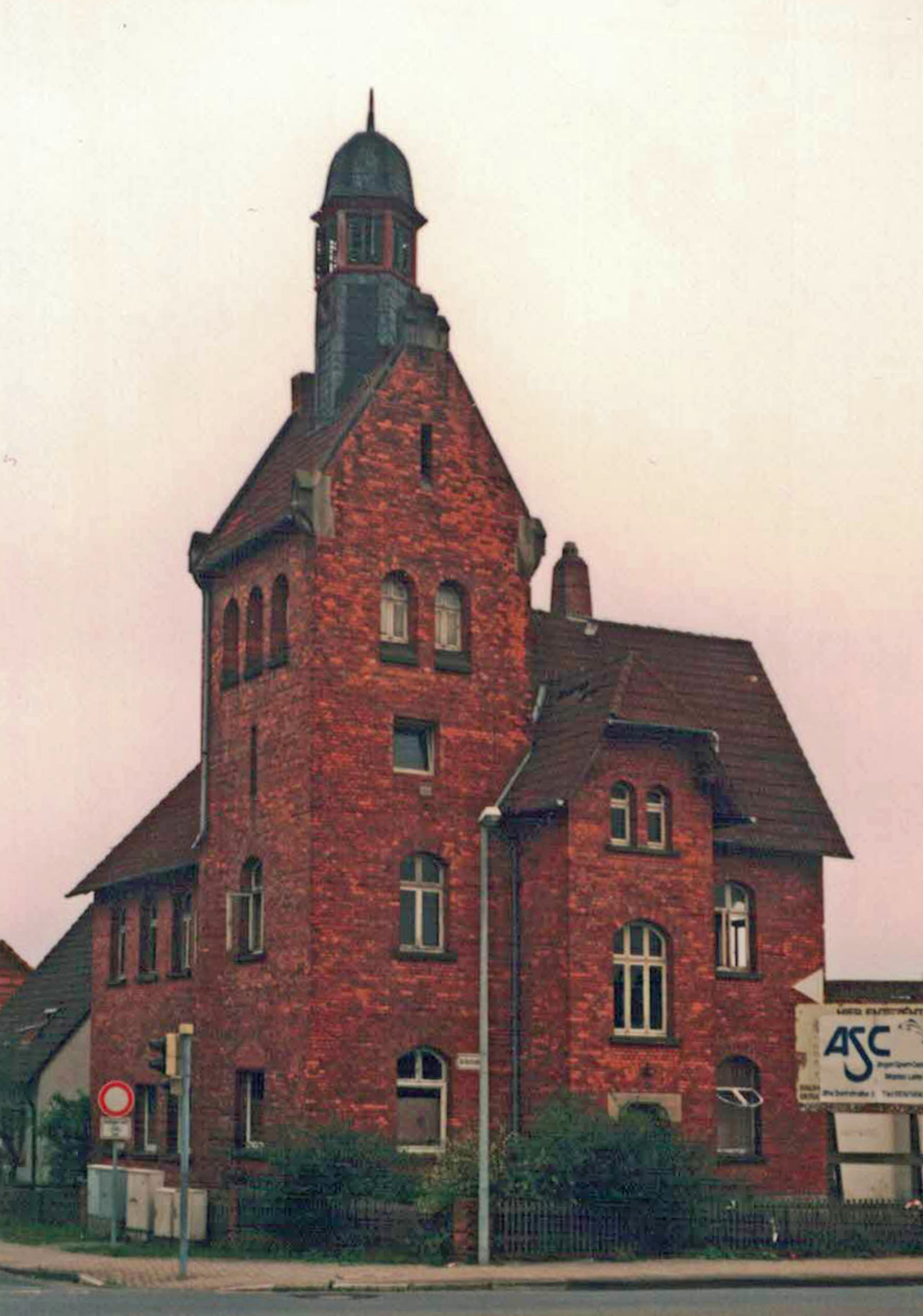 Ehemalige Schule in Kästorf, mit Ausnahme des Turmes um 1989 abgerissen.